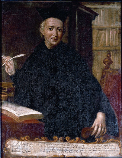 Retrato de Baltasar Gracián. El escritor fue destinado al colegio jesuita de Graus a comienzos de 1658 como represalia por la publicación de las tres partes del Criticón (1651, 1653, 1657). El retrato estuvo en el colegio grausino de la Compañía de Jesús, anexo a la iglesia de los jesuitas, que fue desmantelado en los años 1960. Sin embargo el retrato había sido trasladado anteriormente a la iglesia parroquial de San Miguel de Graus.